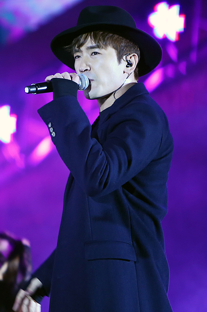 141116 상하이 공연